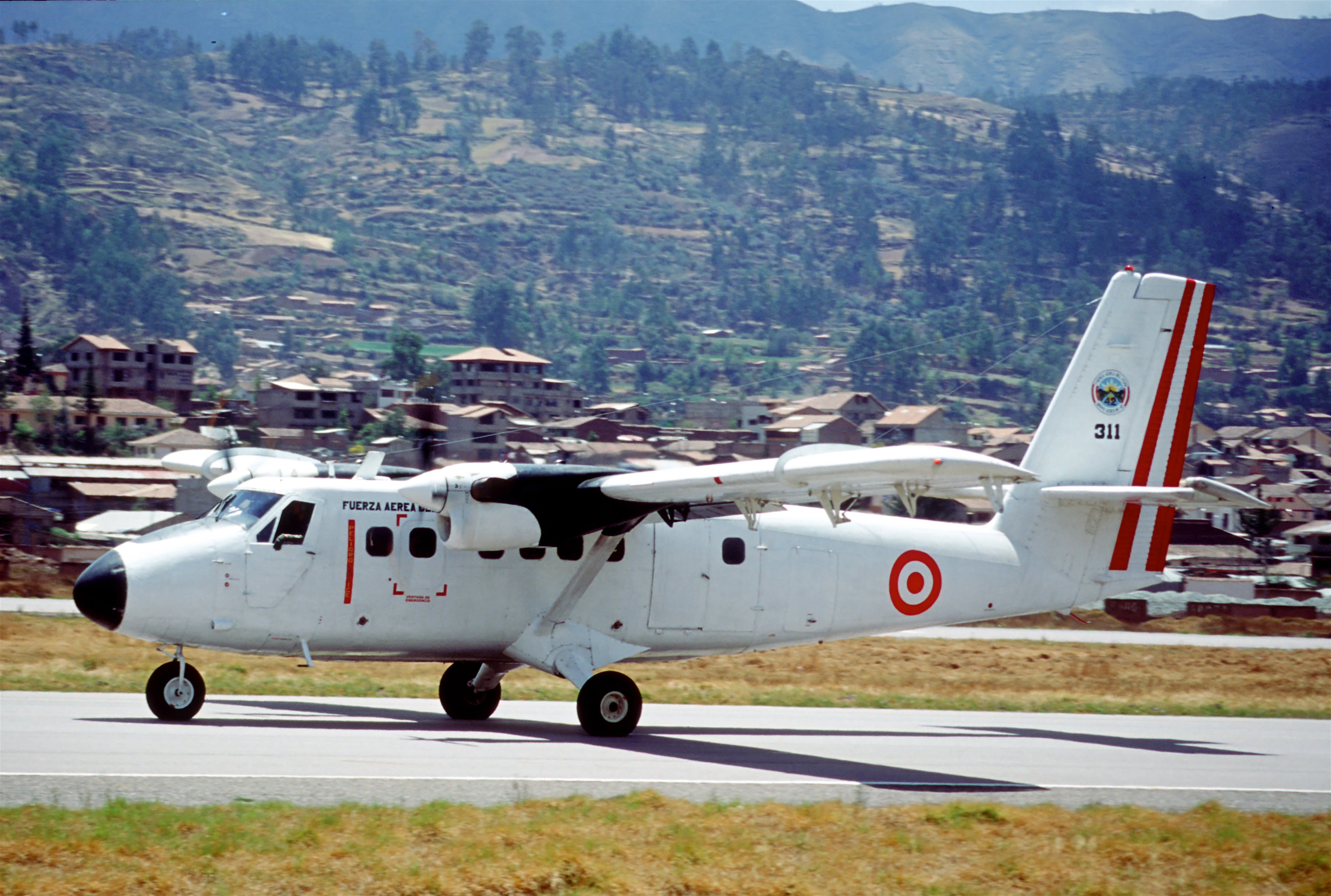 110cc - Fuerza Aérea del Peru DHC-6 Twin Otter 300; 911@CUZ;29.09.2000